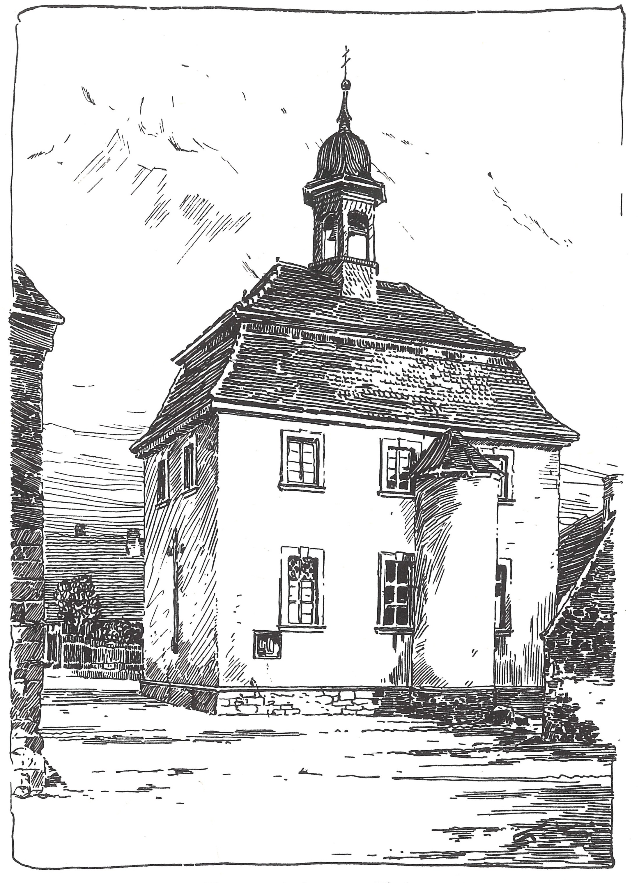 Karlinger, Hans: Die Kunstdenkmäler. S. 37.